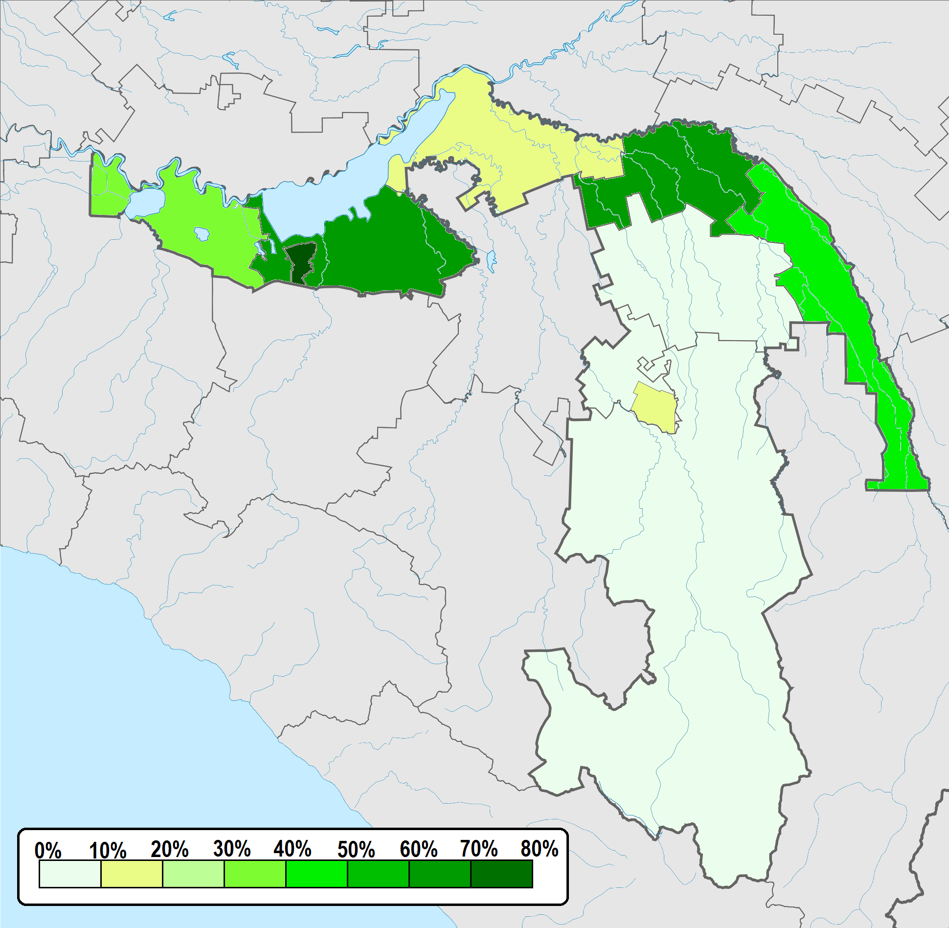 Адыгейцы в Адыгее (2002)